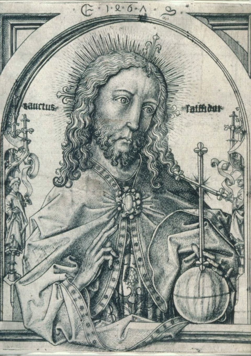 Maitre ES L.56 Christ salvateur sanctus salffidor